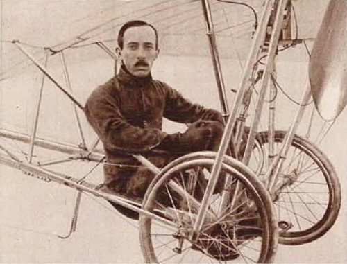 Photo de Santos-Dumont, pionnier de la conquête de l'air, sur son avion monoplan. Issue de "Lectures pour tous" du 1er janvier 1914, en ligne sur Wikisource à